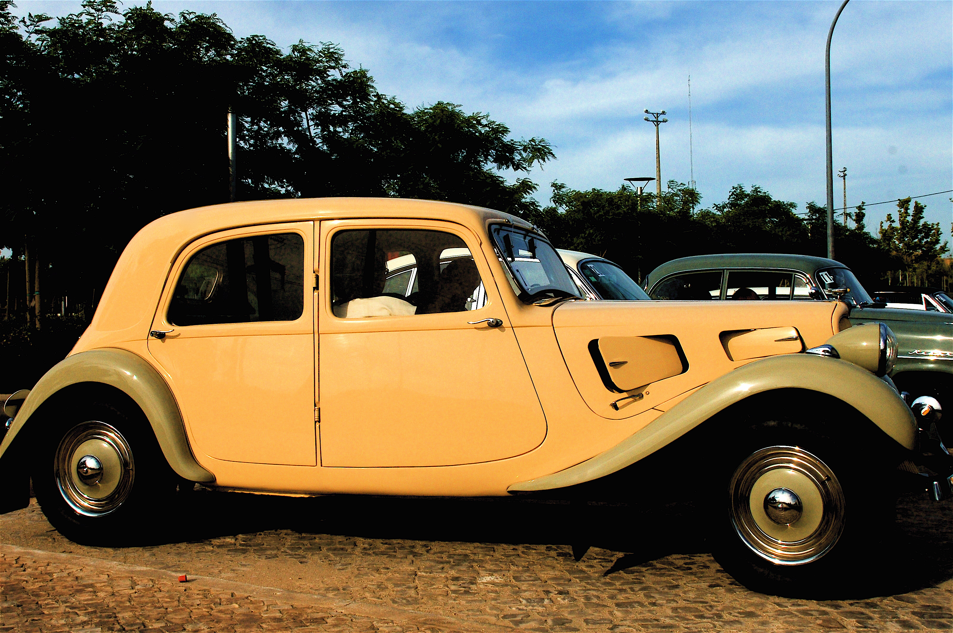 Oeiras, Portugal.